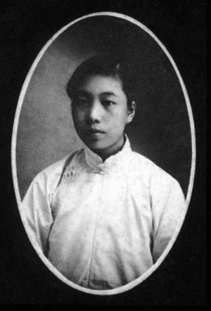 青年许广平